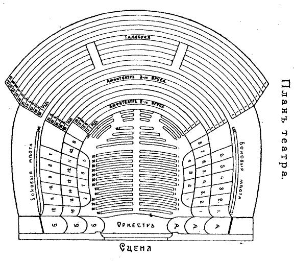 Сцена нового городского театра в Екатеринбурге